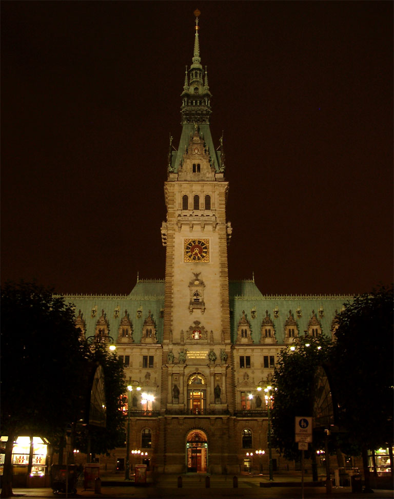 Hamburg Rathaus bei Nacht 01 KMJ